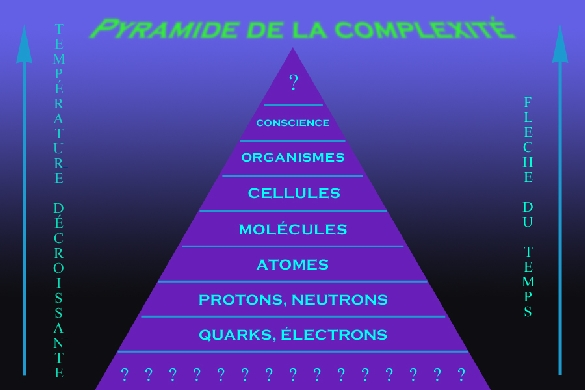 Représentation particulière de la pyramide de la complexité